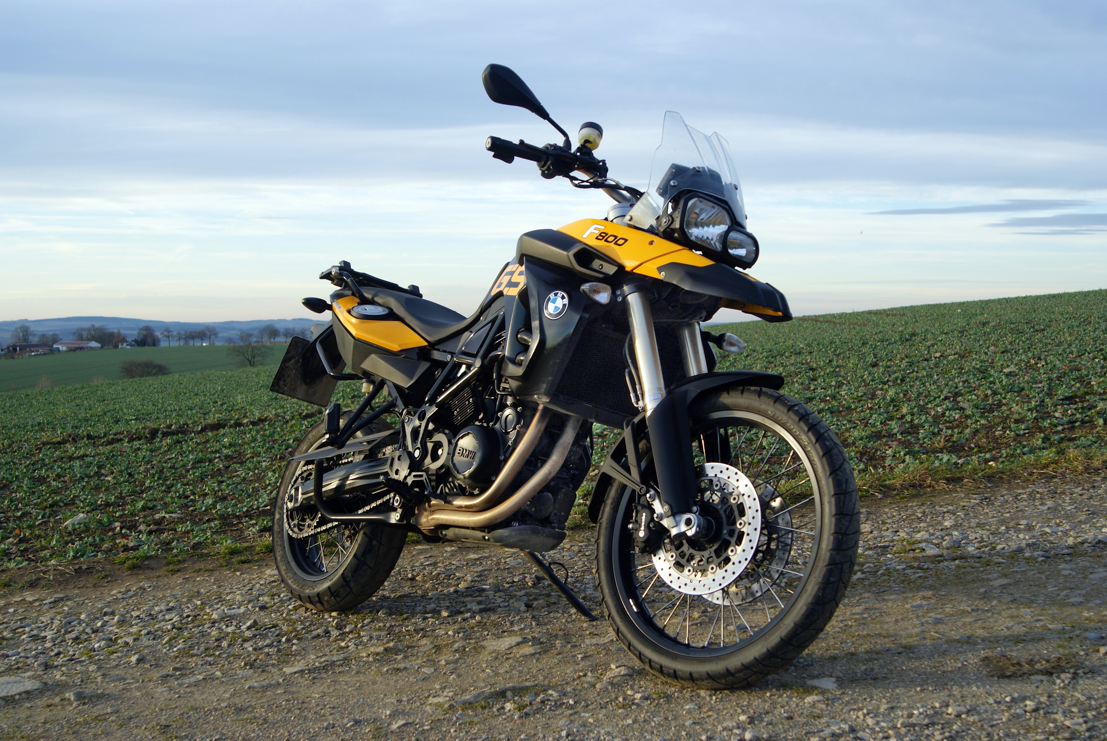 BMW F 800 GS BJ 2008